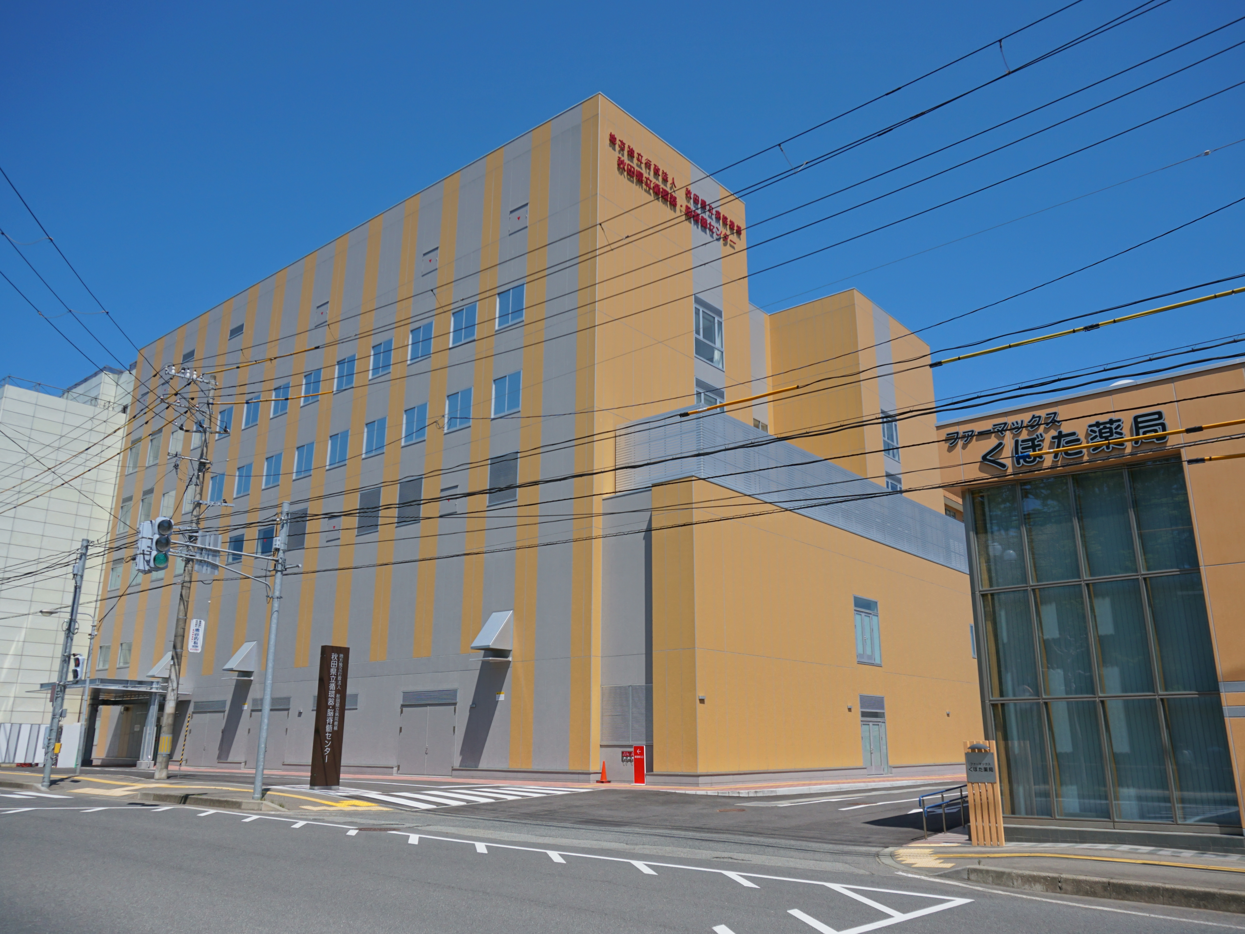 秋田県立循環器・脳脊髄センター（秋田市千秋久保田町）。「脳研」の通称で知られた秋田県立脳血管研究センターを2019年に改称した。